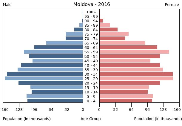 A population pyramid illustrates the age and sex structure of a country's population and may provide insights about political and social stability, as well as economic development. The population is distributed along the horizontal axis, with males shown on the left and females on the right. The male and female populations are broken down into 5-year age groups represented as horizontal bars along the vertical axis, with the youngest age groups at the bottom and the oldest at the top. The shape of the population pyramid gradually evolves over time based on fertility, mortality, and international migration trends.